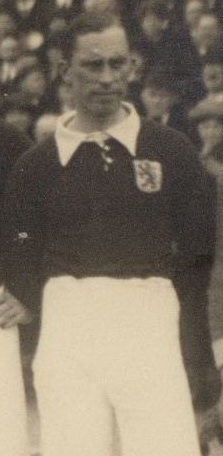 Tinus van Beurden - was een Nederlands voetballer.